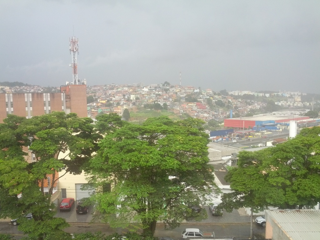 Vista da Regiao central do Municipio de Cotia